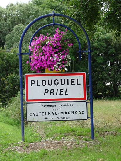 Priel. Panell ar Gêr